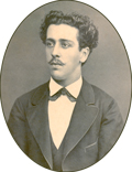 Template:Isaac Garza